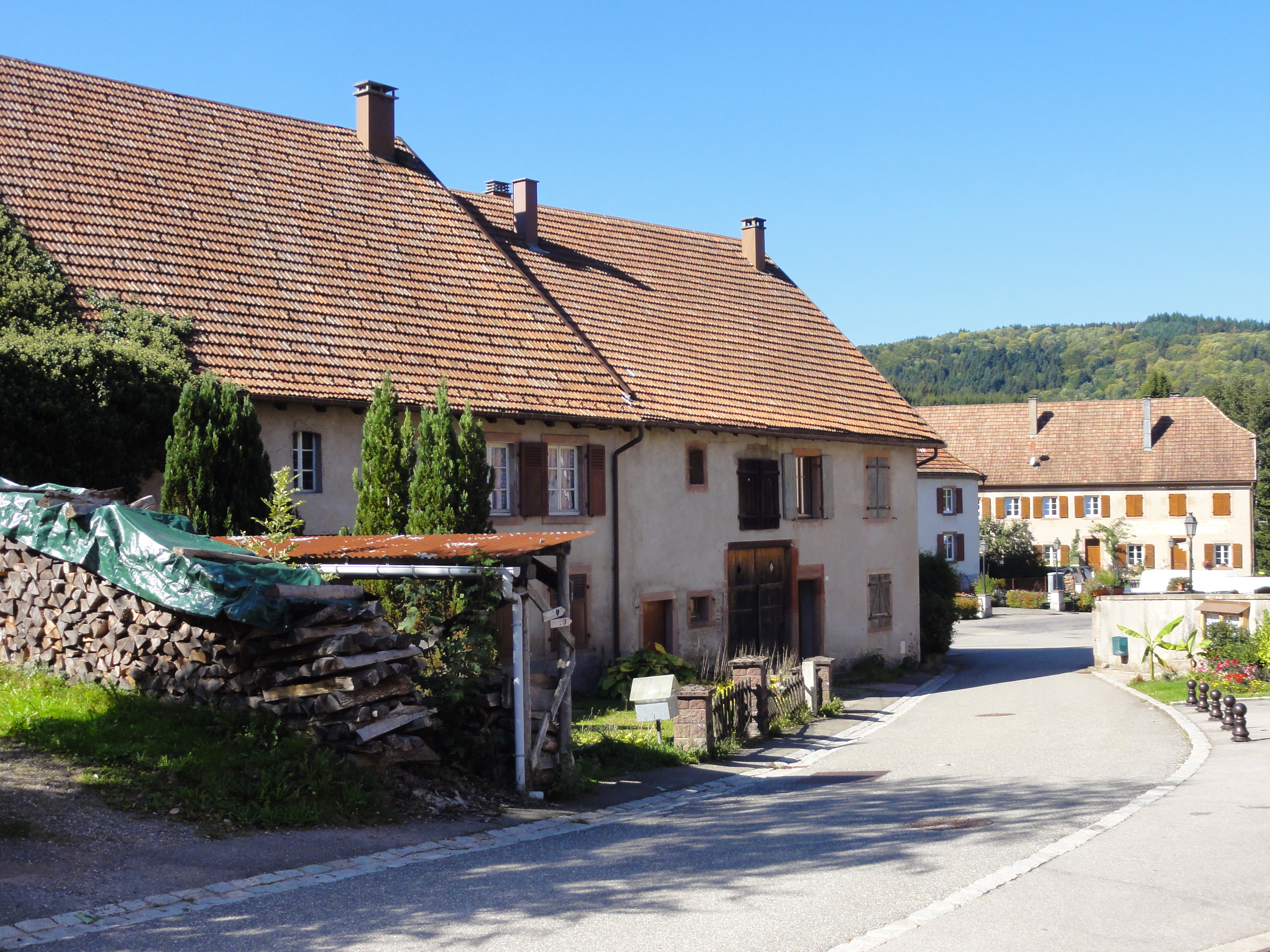 Alsace, Bas-Rhin, Ranrupt, Anciennes fermes, 3 et 1 rue de la Mairie.